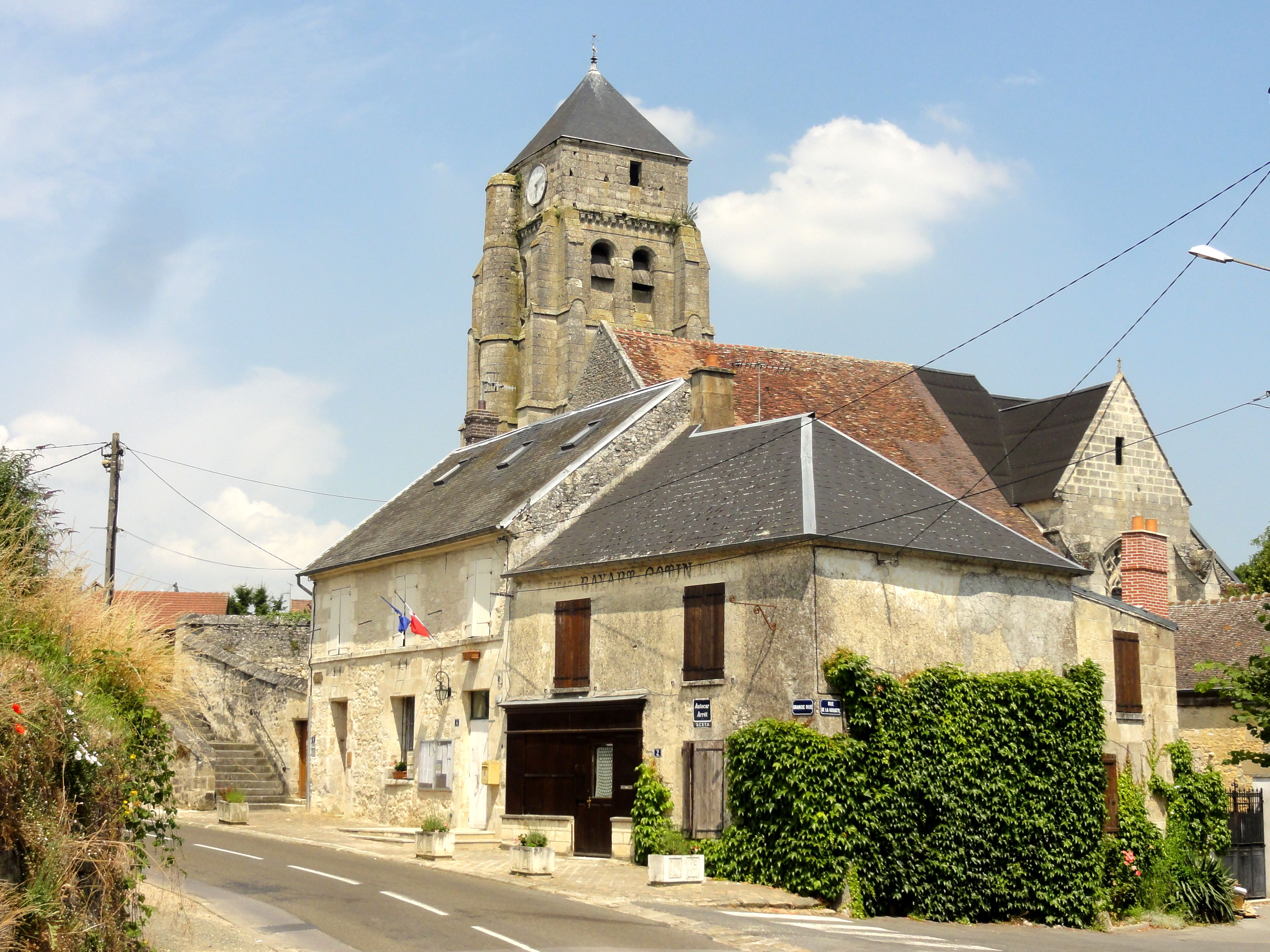 La mairie et l'église.